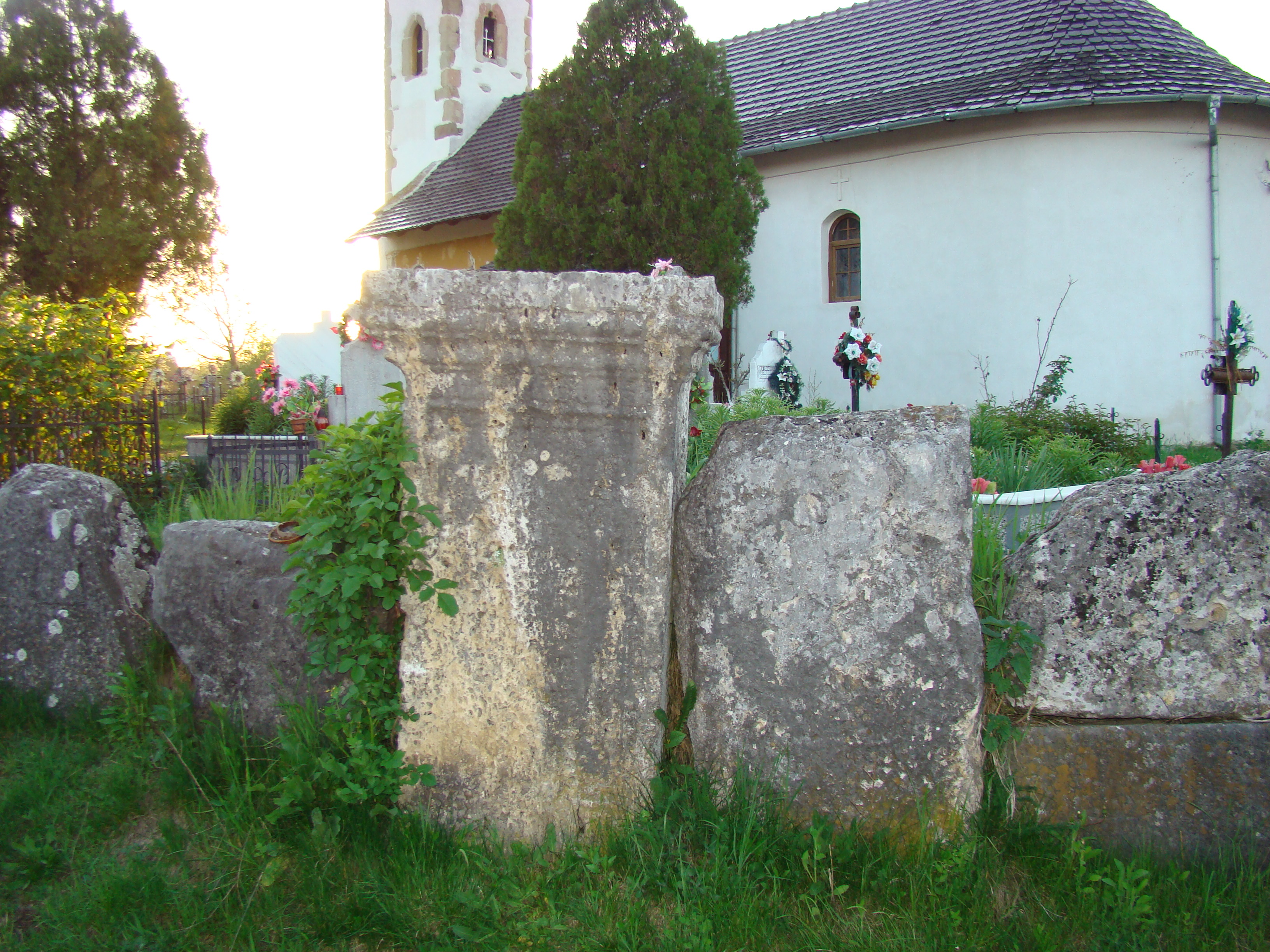 Biserica "Pogorârea Sfântului Duh", sat OSTROV; comuna RÂU DE MORI 01